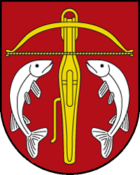 Armoiries de l'ancienne commune d'Immensee, aujourd'hui intégrée à la commune de Küssnacht, dans le canton de Schwyz, telles qu'elles sont représentées sur la locomotive CFF Re 6/6 11681.